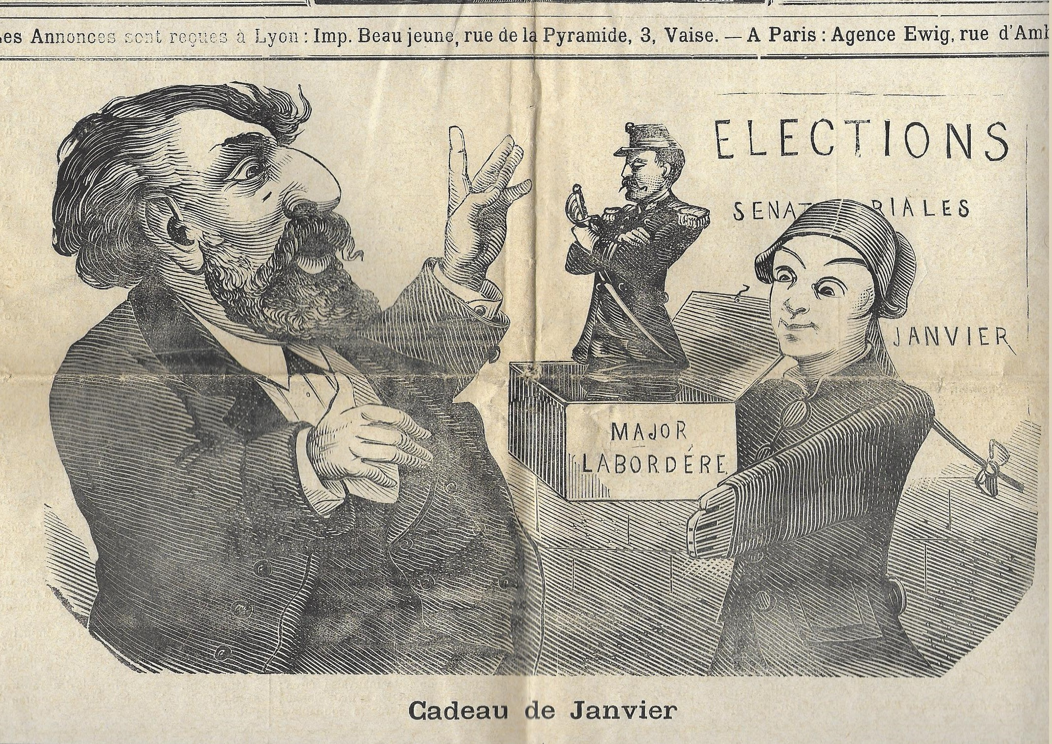 Journal satirique Le Carillon décembre 1881